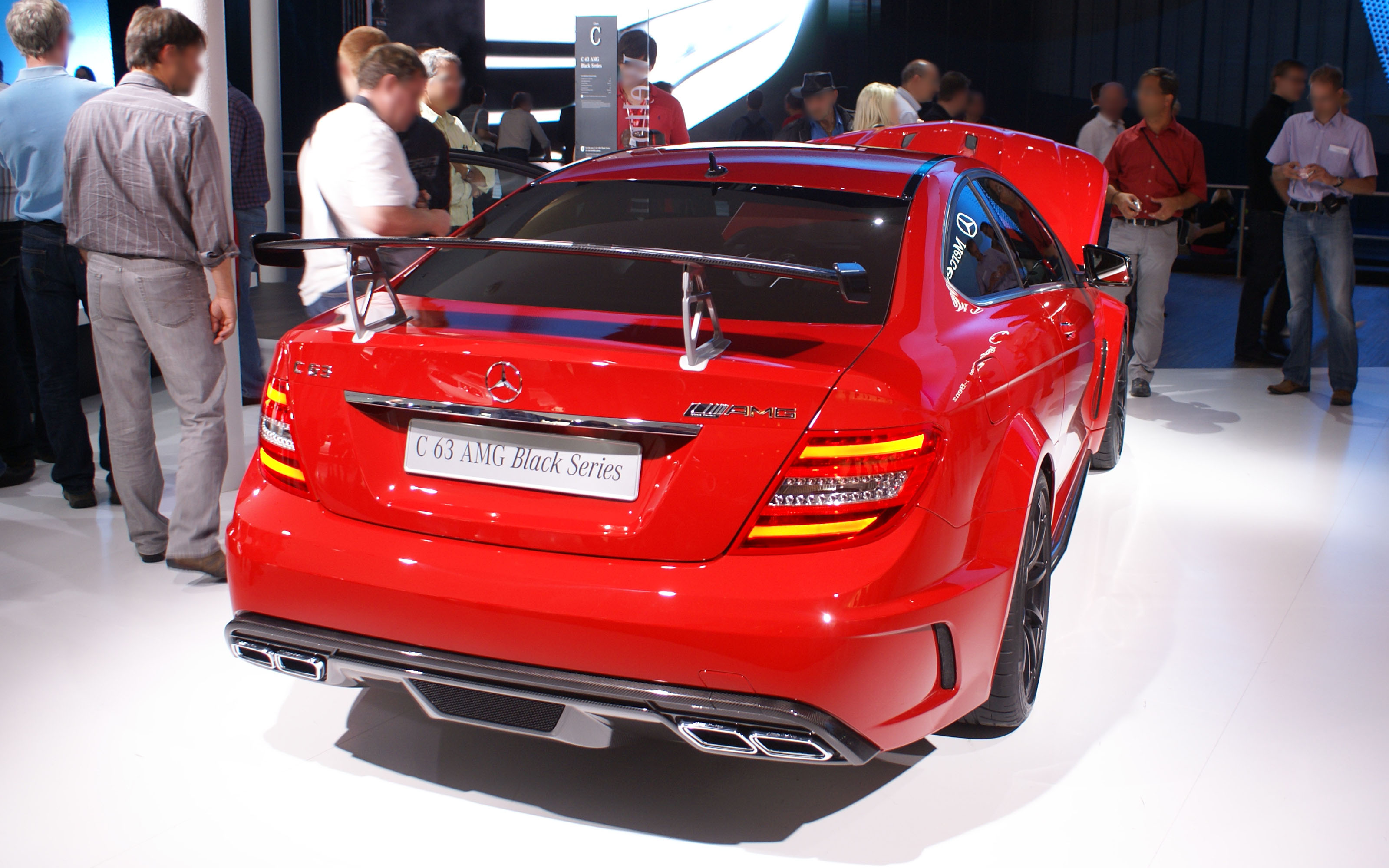 Mercedes-Benz C 63 AMG Coupé Black Series